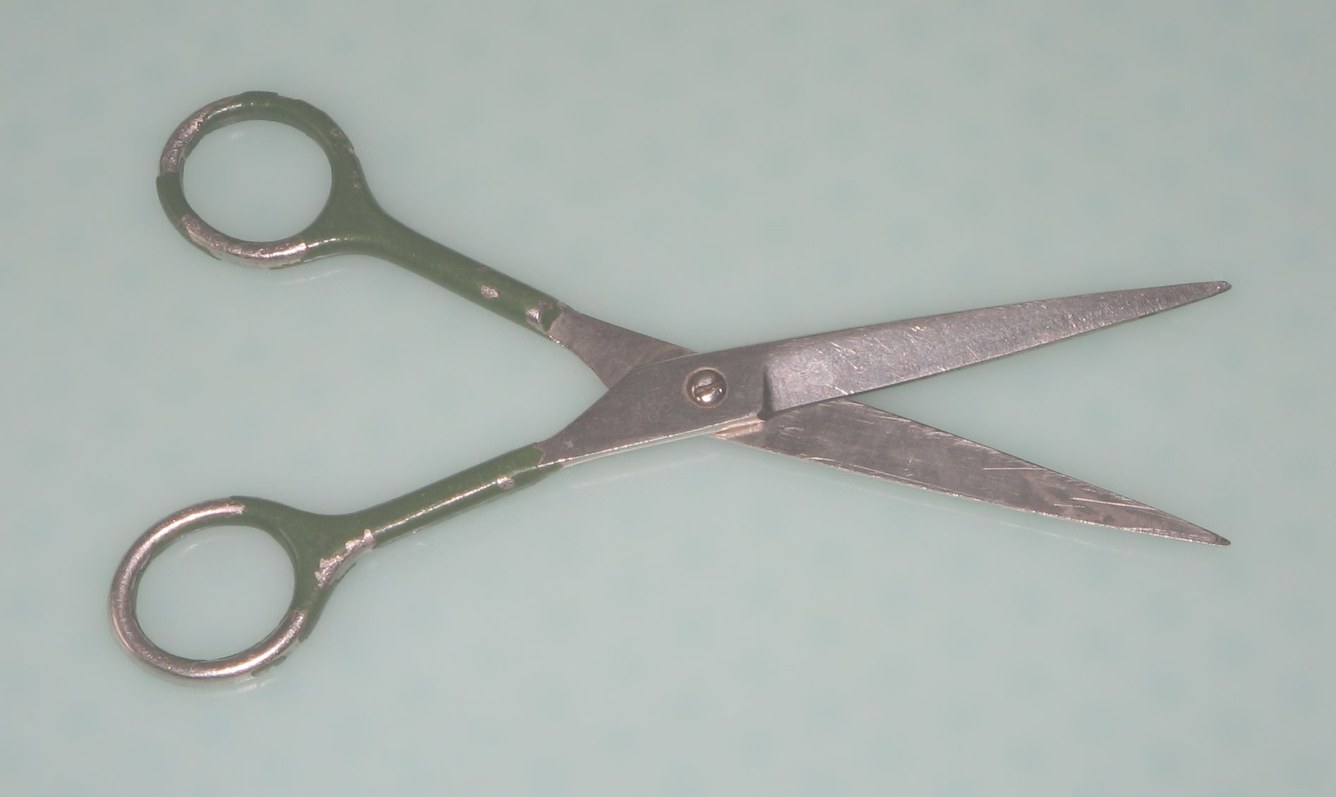 Tondilo La foto estis farita de mi mem.